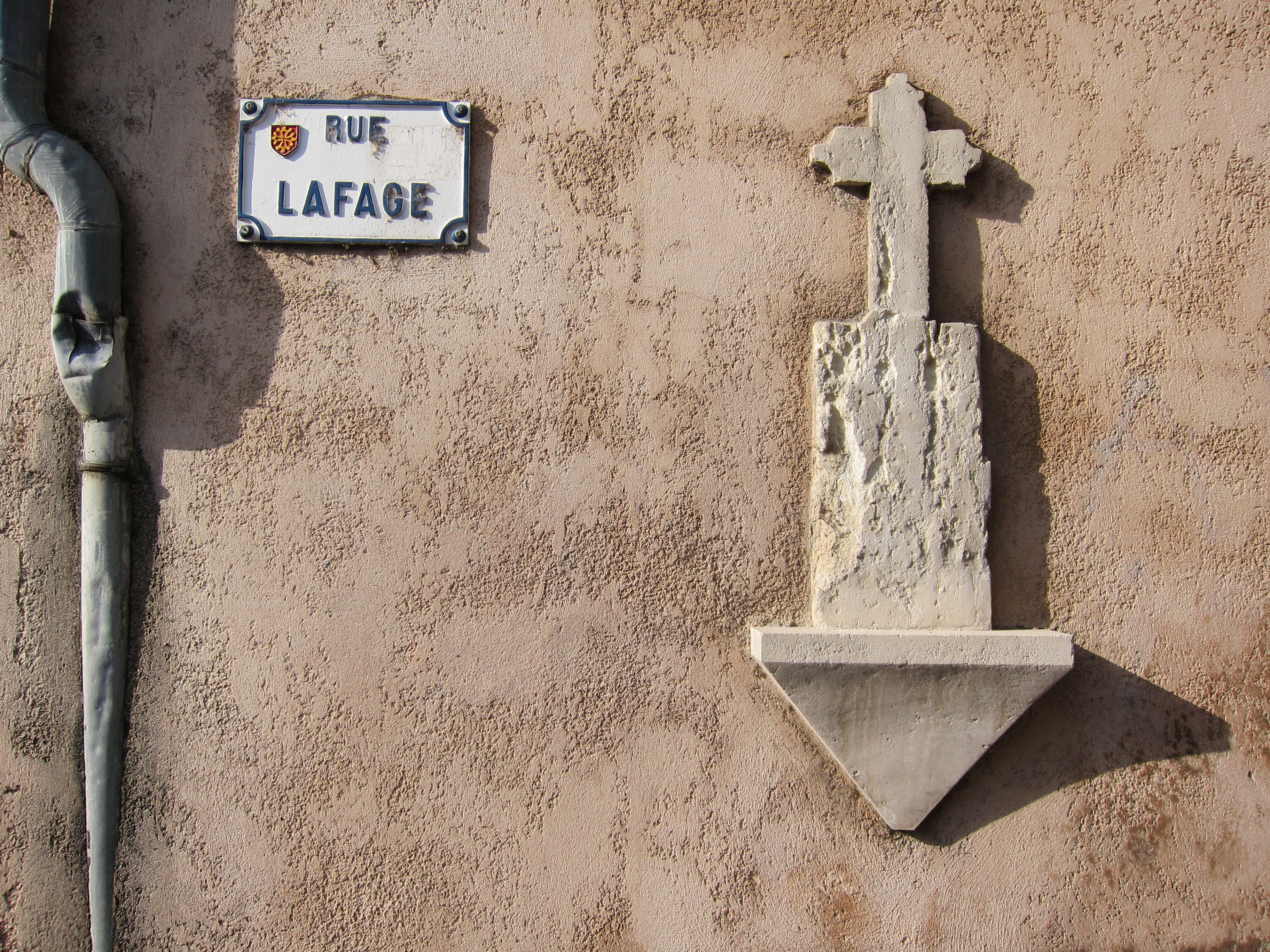 Toulouse (Haute-Garonne, France) : Croix de Pierre, rue Lafage, réalisée après la destruction de l'originale par la crue de 1875.